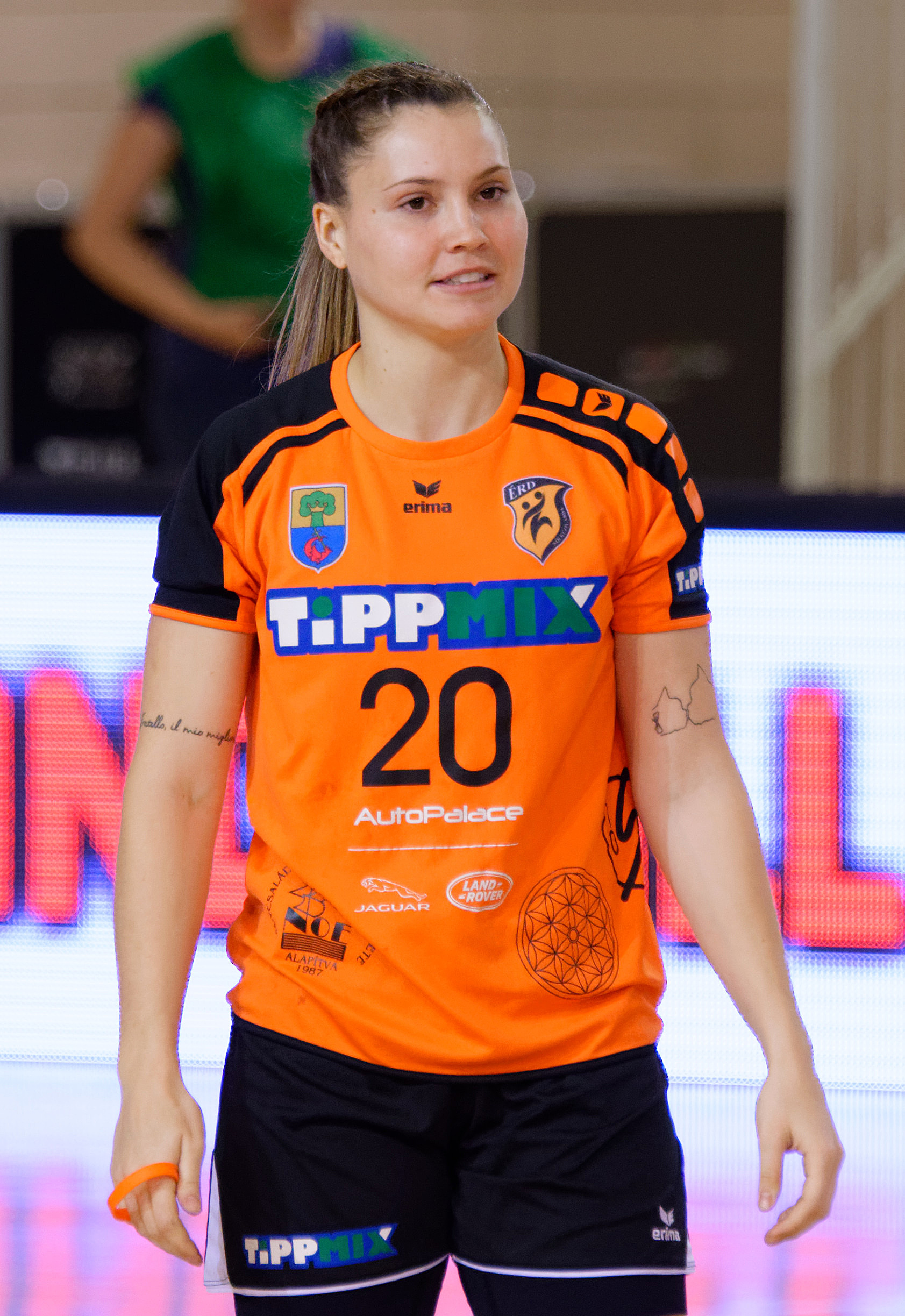 Rencontre du 2e tour de la coupe EHF entre Issy Paris Hand et Érd HC. A Issy Les Moulineaux, le 23 octobre 2016.